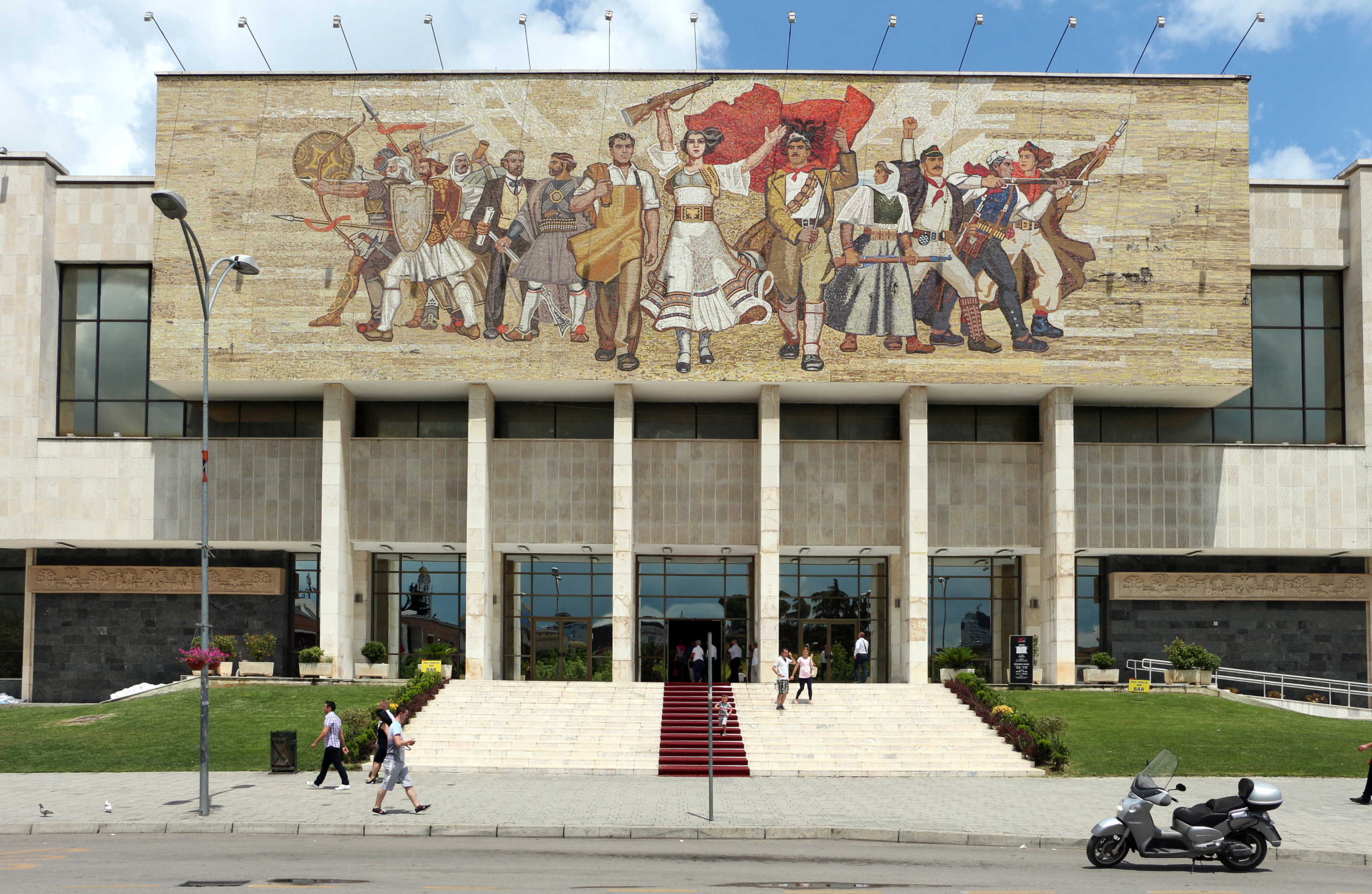 Muzeu Historik Kombëtar